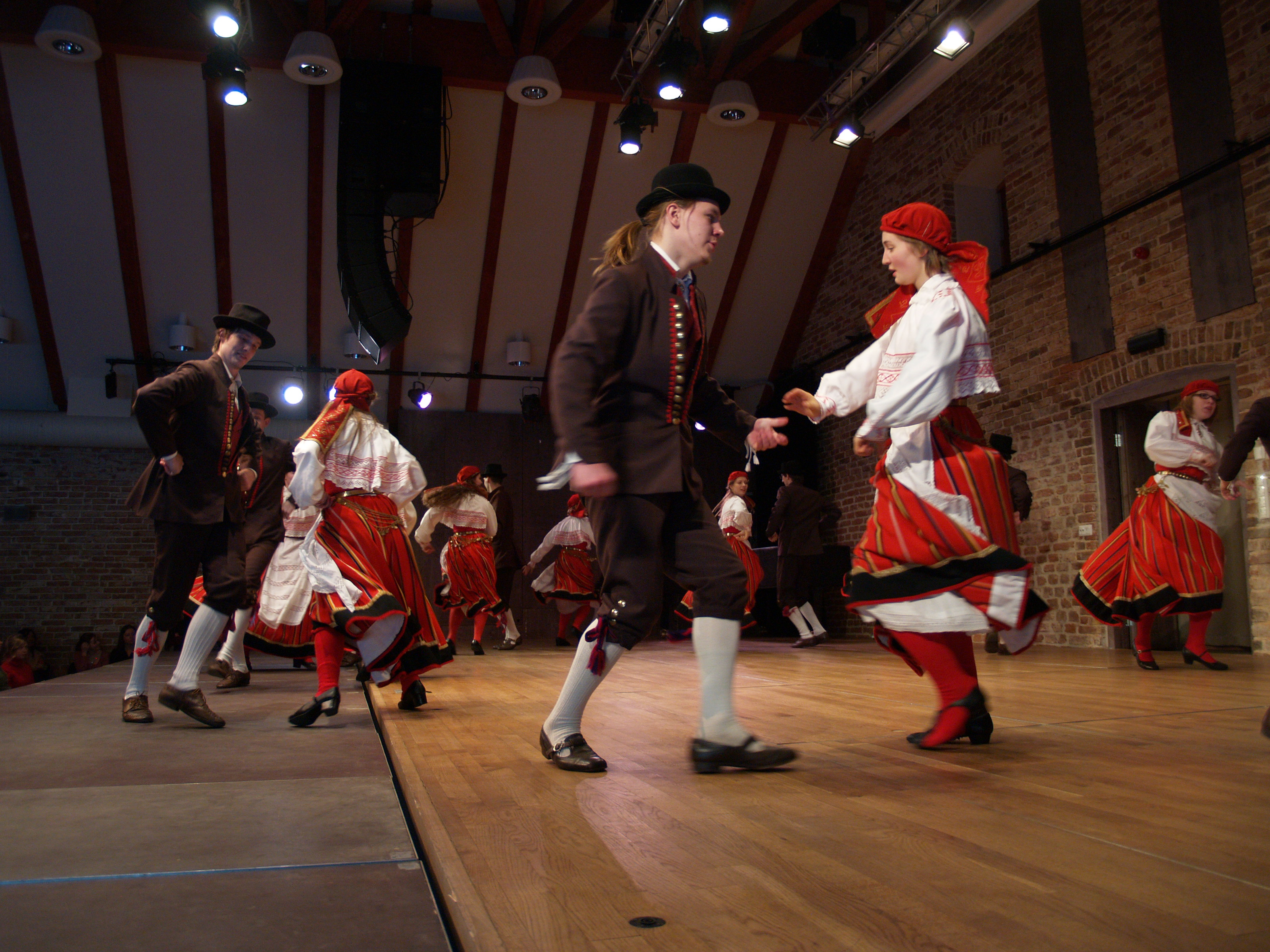 Tartu Ülikooli Rahvakunstiansambli Viljandi talvisel tantsupeol 2010. aastal.